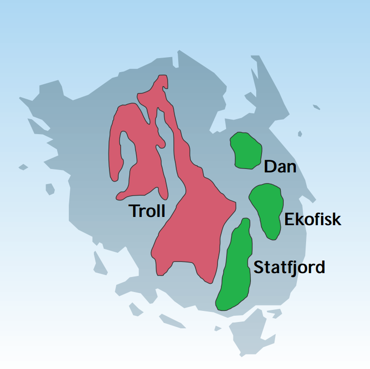 Nogle nordsø-oliefelter sammenlignet med Fyn